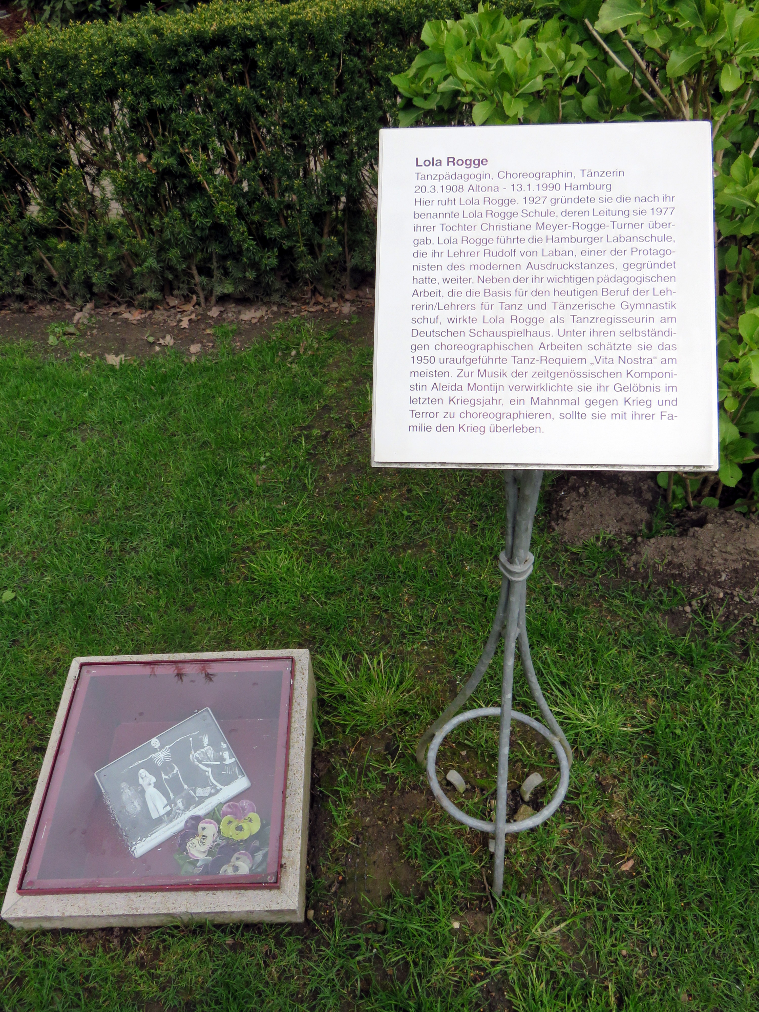 Gedenkplatz für die deutsche Tanzpädagogin Lola Rogge im Bereich des Gartens der Frauen auf dem Ohlsdorfer Friedhof in Hamburg-Ohlsdorf (früher vor der Hecke außerhalb des Gartens, jetzt: vor der Hecke innerhalb des Gartens, begleitet von einer Gedächtnis-Glasvitrine am Boden neben der Informationstafel).